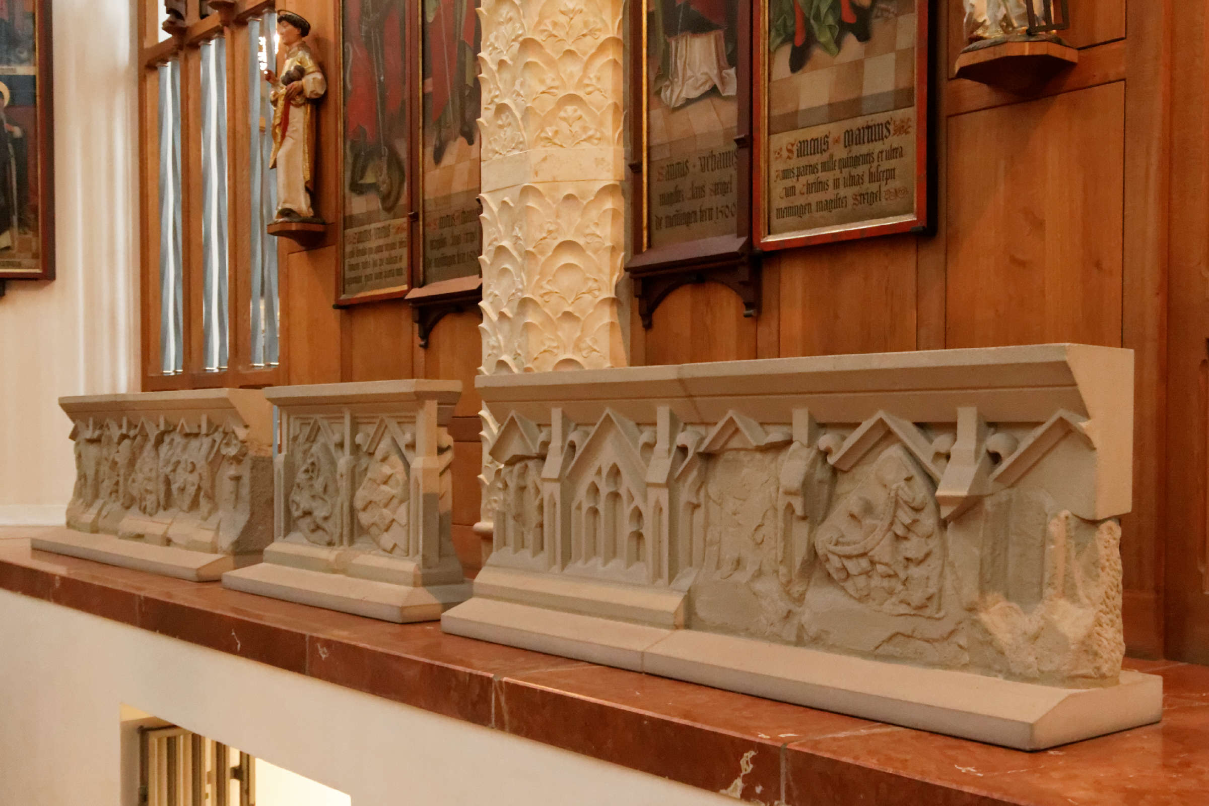 Seitenplatten des Hochgrabs der Beatrix von Beatrix von Schlesien-Schweidnitz in der Frauenkirche in München